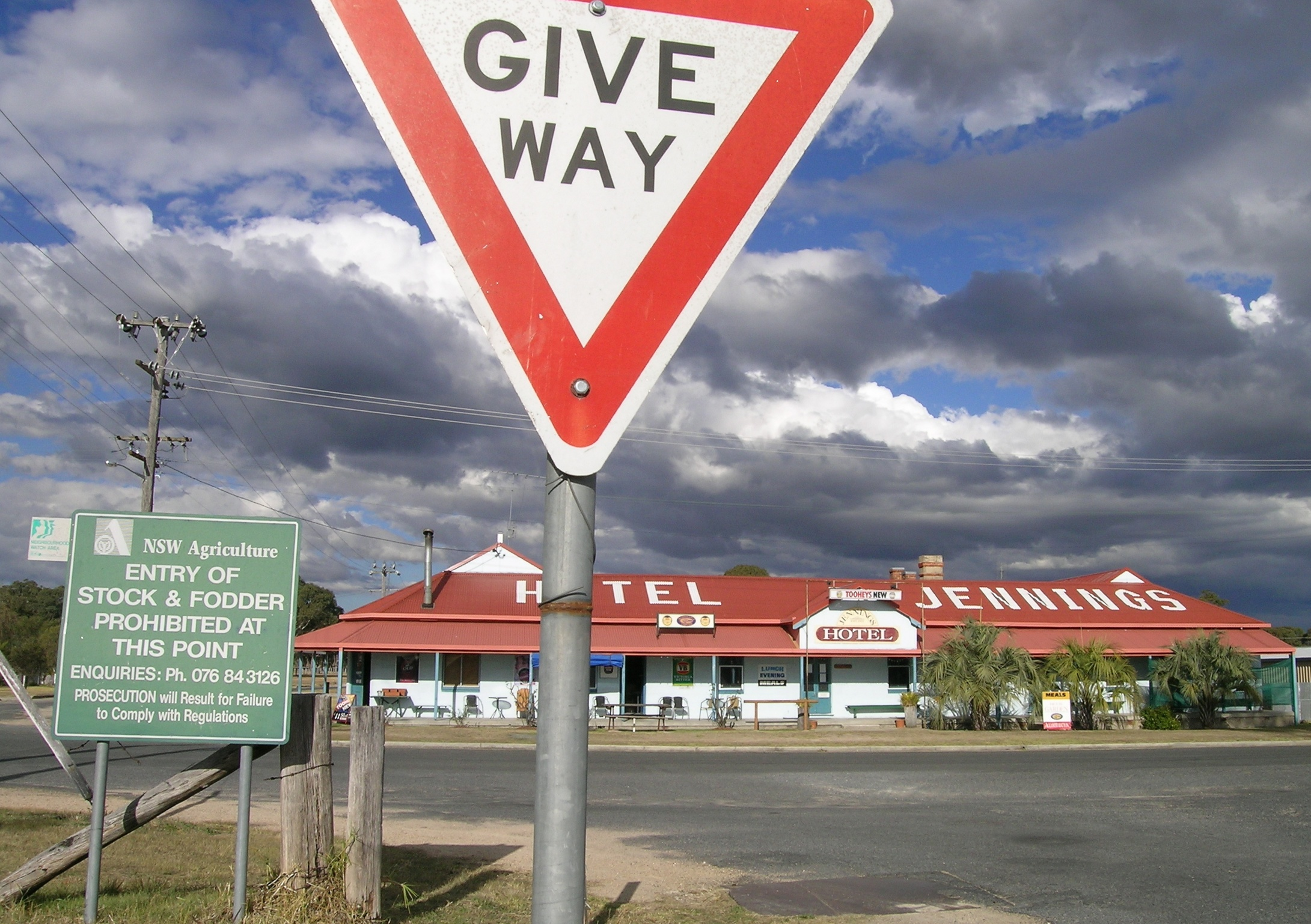 Hotel, Jennings, NSW